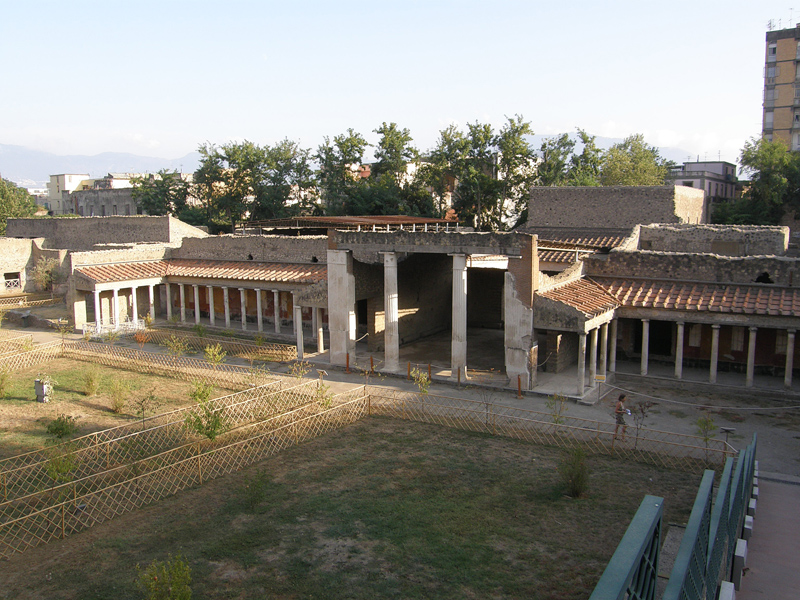 Villa Poppaea (Torre Annunziata)